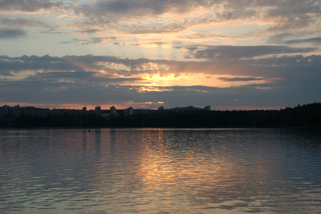 Velký Bolevecký rybník v Plzni při západu slunce